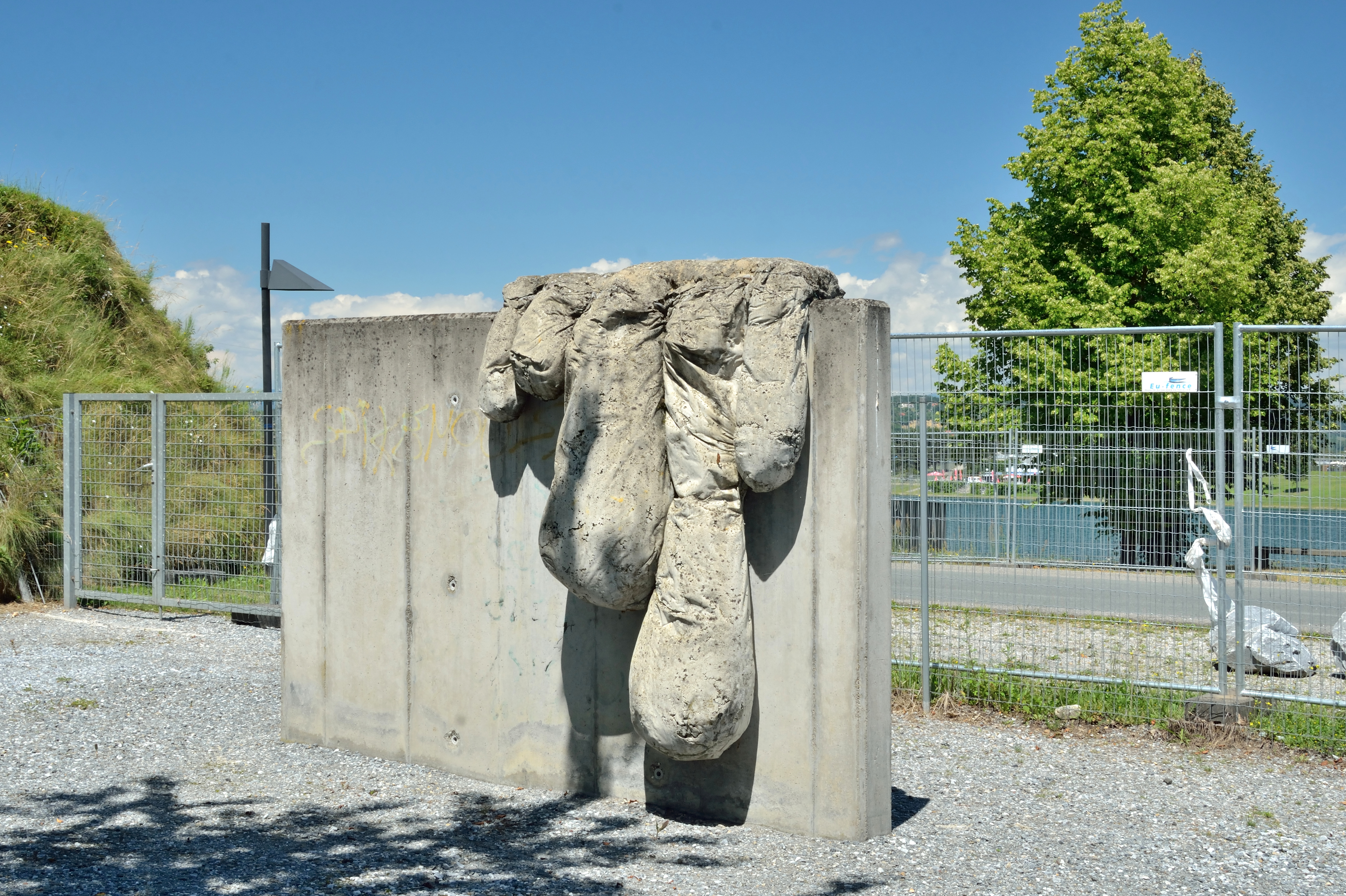 Wand von Erwin Bohatsch im Österreichischen Skulpturenpark in Premstetten / Kalsdorf bei Graz. Die Skulptur stammt aus dem Jahre 1992.